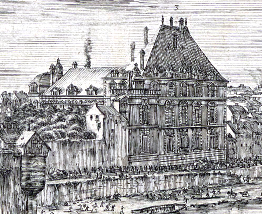 The Hôtel de Nevers in Paris, detail from La perspective du Pont neuf de Paris